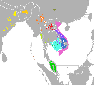 Lenguas munda Khásico Paláunguico Khmuico Pakánico Vietnamita Katuico Bahnárico Camboyano Peárico Nicobarés Asli Mon